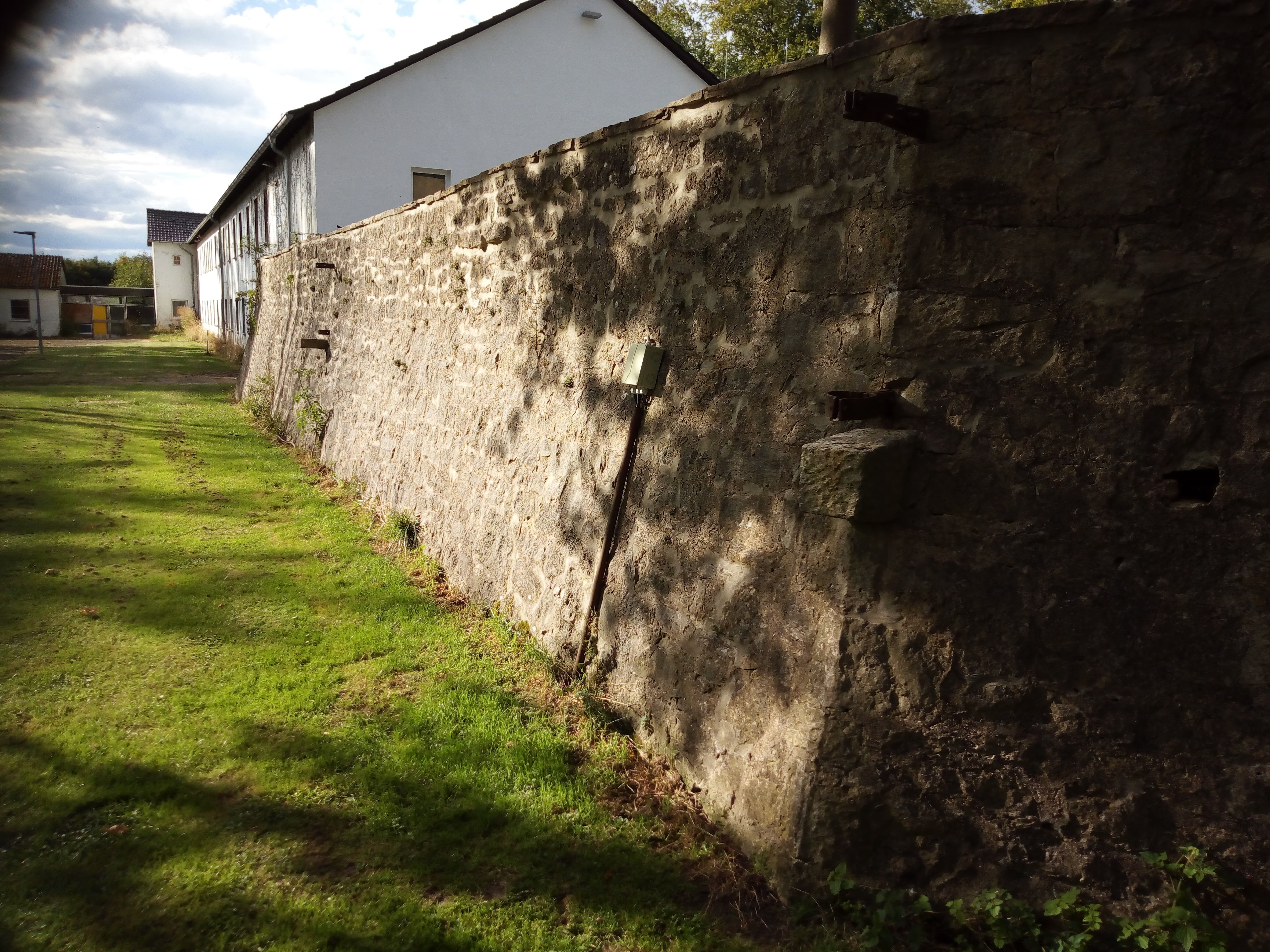 Offizierslager VI B in Dössel, Befestigung mit Pfostenträger